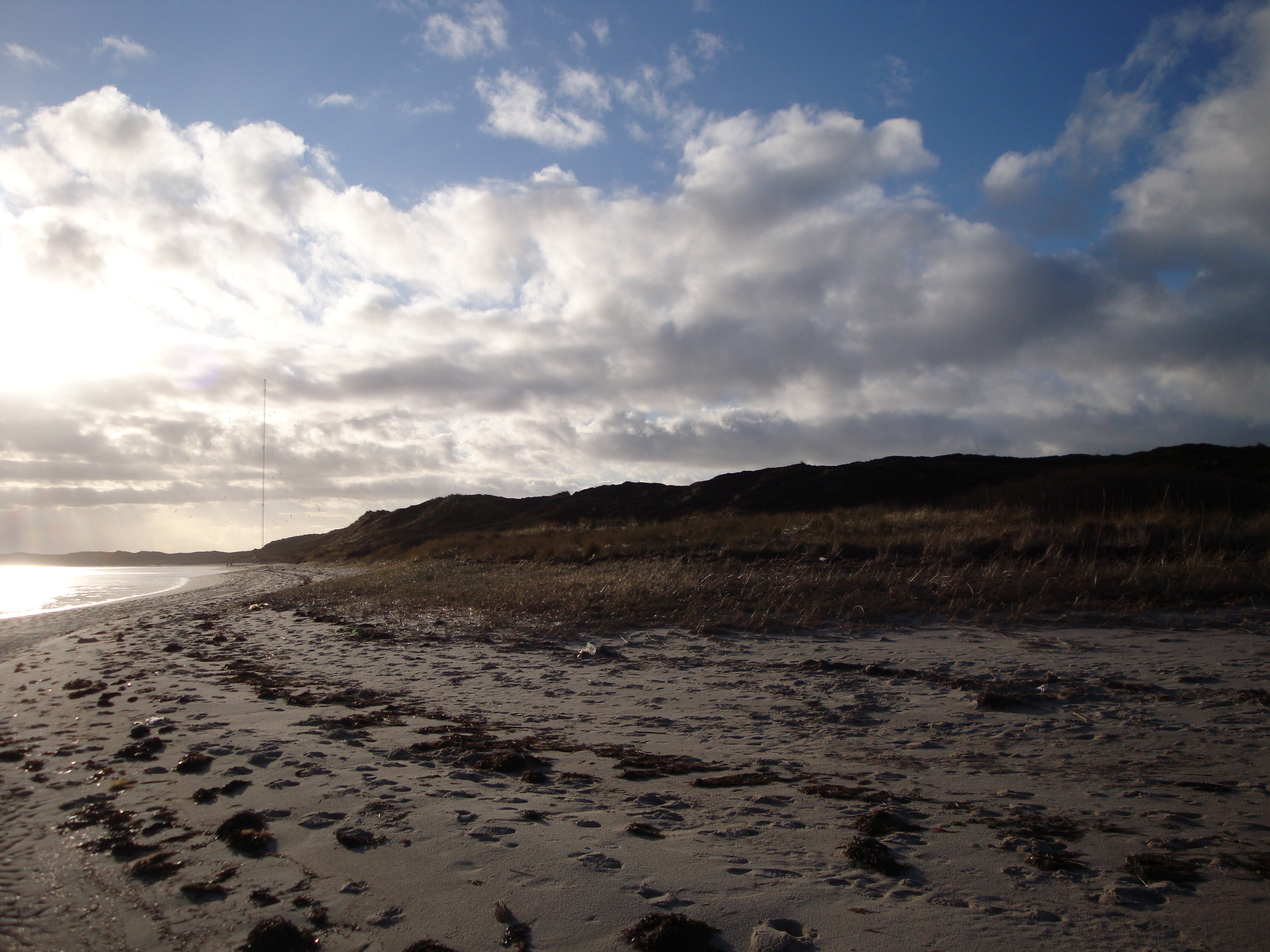 Wattenmeerküste an der Ostseite Sylts bei Rantum.